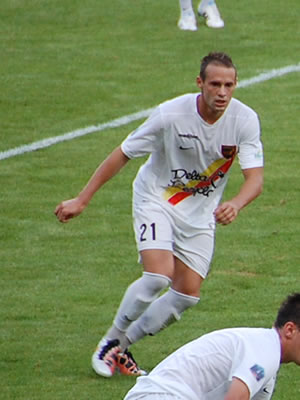 Joueur de football professionnel Ulrick Chavas sous les couleurs du FC Martigues lors de la saison 2011-2012 lors du match Paris FC - FC Martigues.